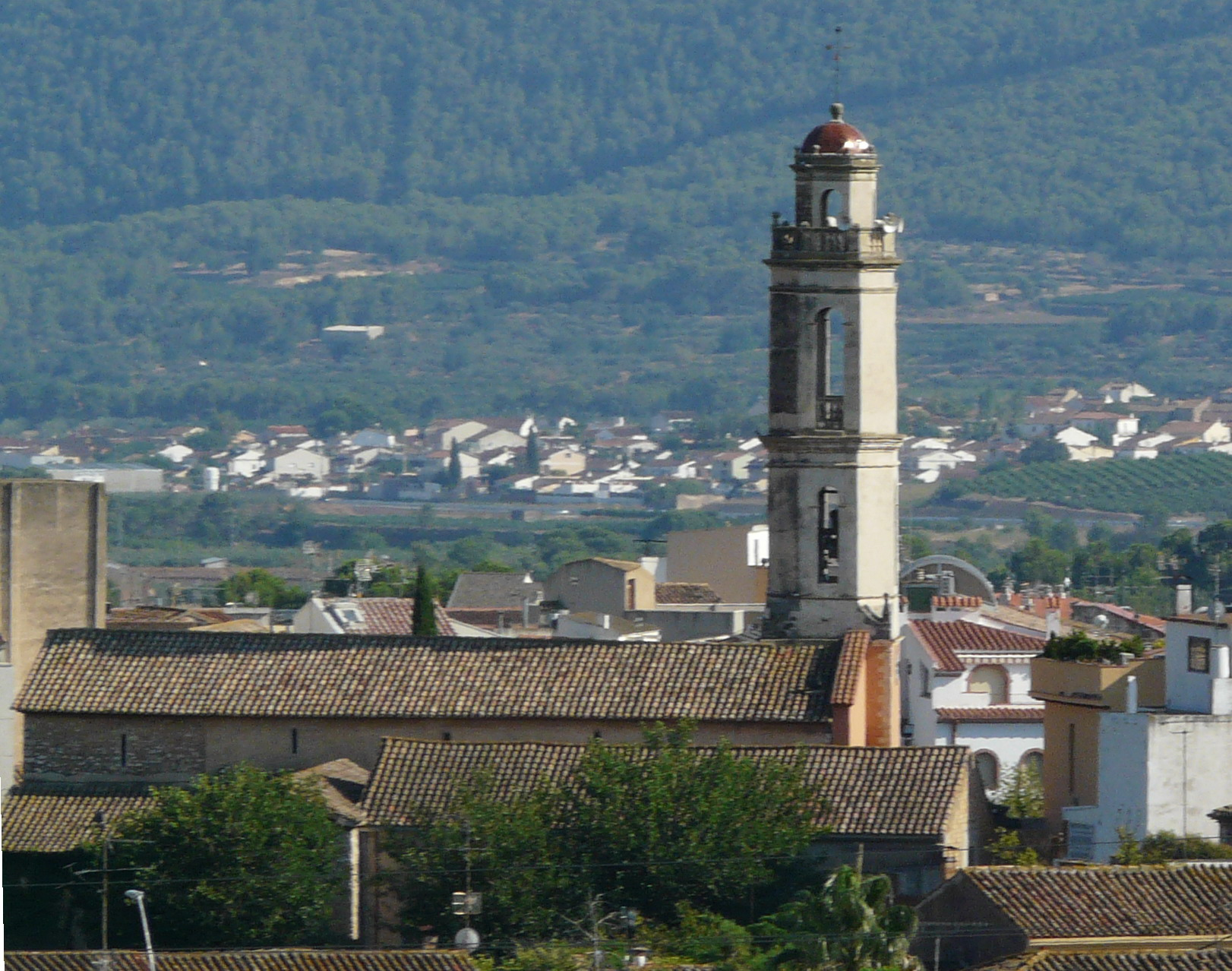 Església parroquial de Santa Maria. C. Major (La Bisbal del Penedès). Object location41° 16′ 51.71″ N, 1° 29′ 16.76″ E